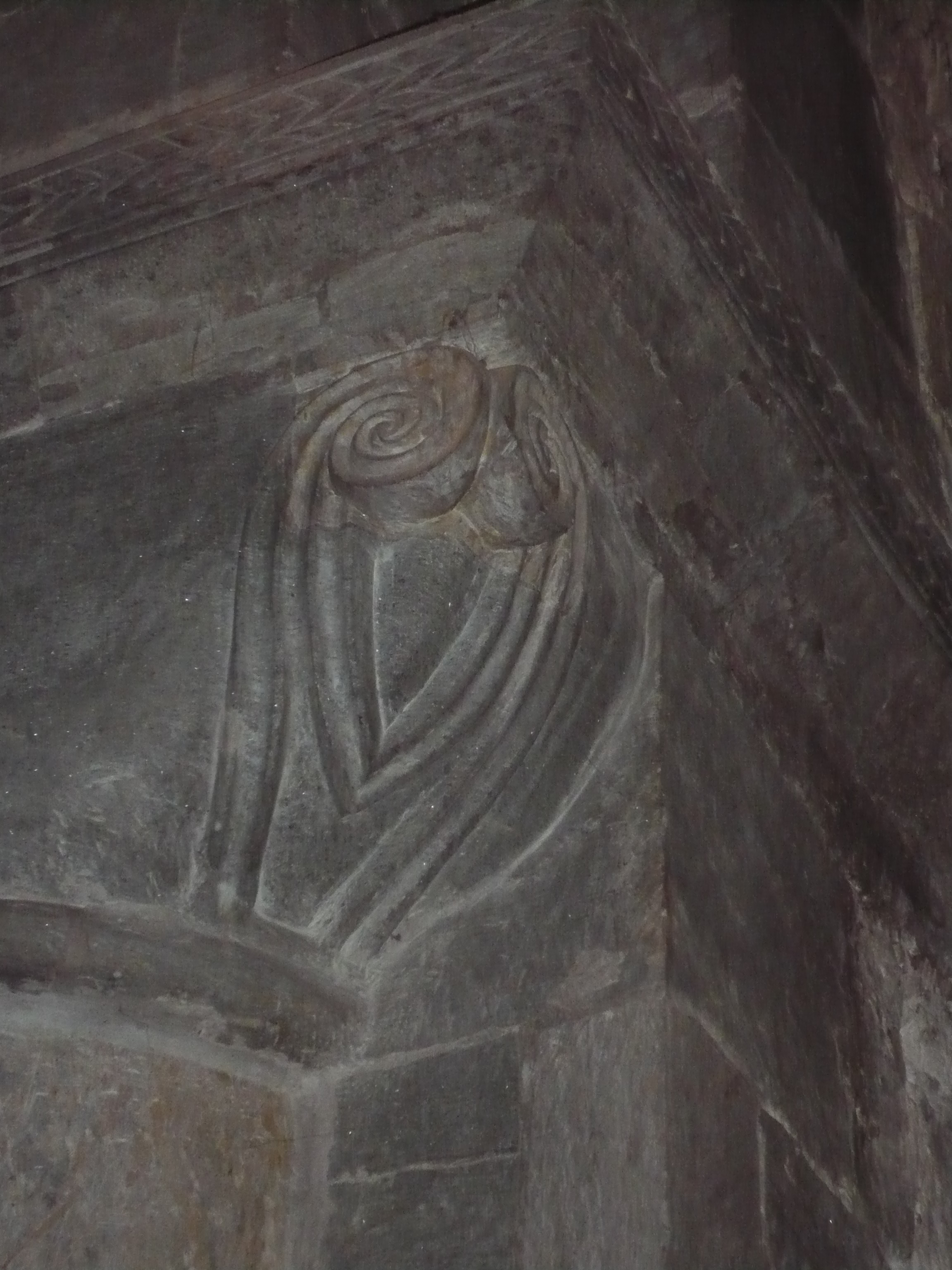 Kapitel i Stavanger Domkirke - i den sørlige søylerekka lengst i øst.